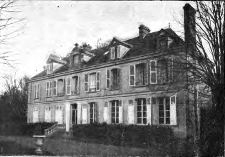 Palais abbatial de l'abbaye Notre-Dame de l'Eau, photographie, vers 1906.